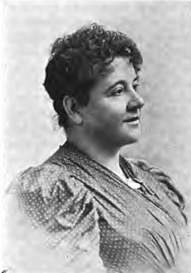 Ermenegilda Zucchini-Majone (1850 ca.-1924), attrice teatrale